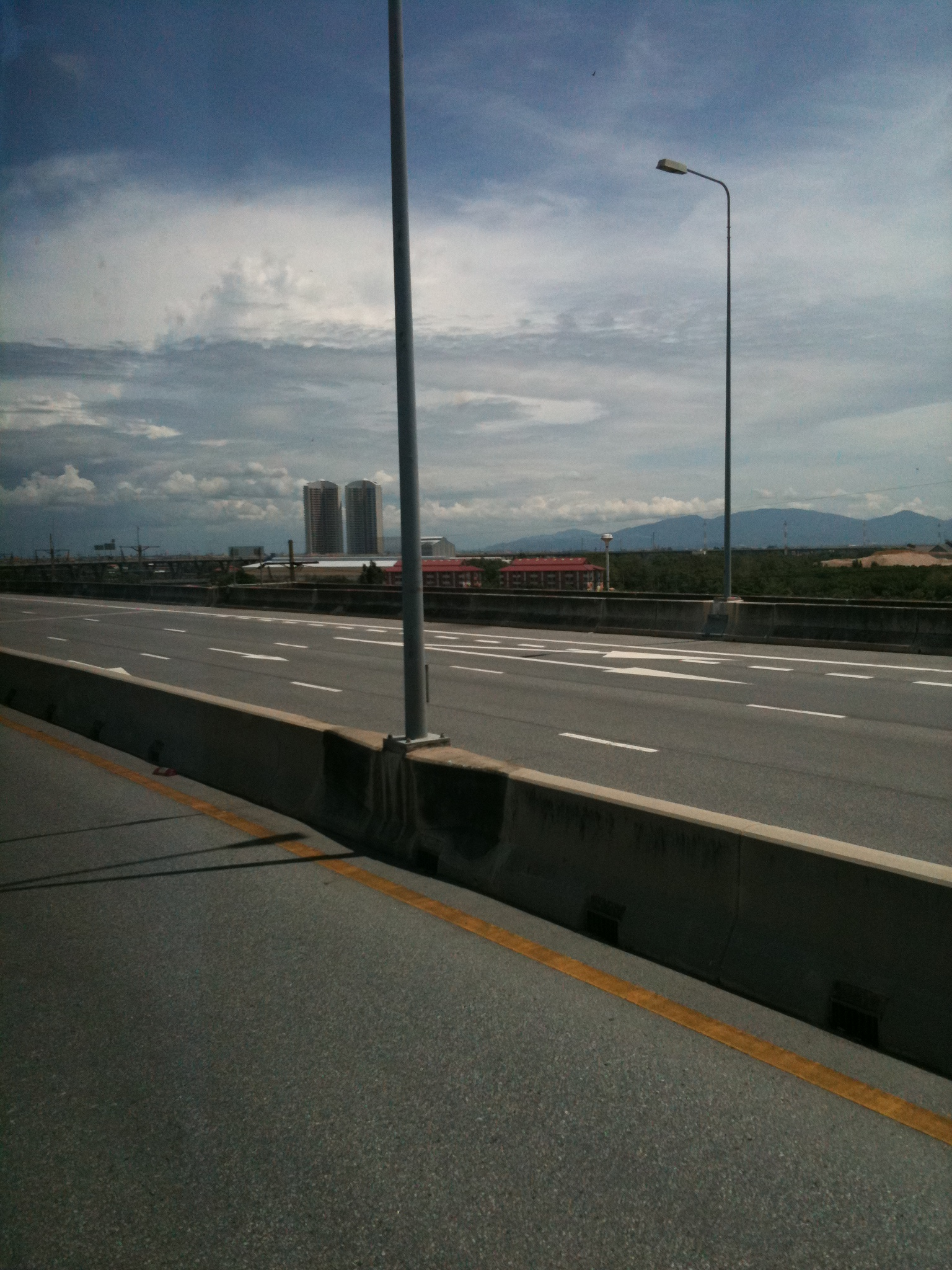 Amazing Thailand